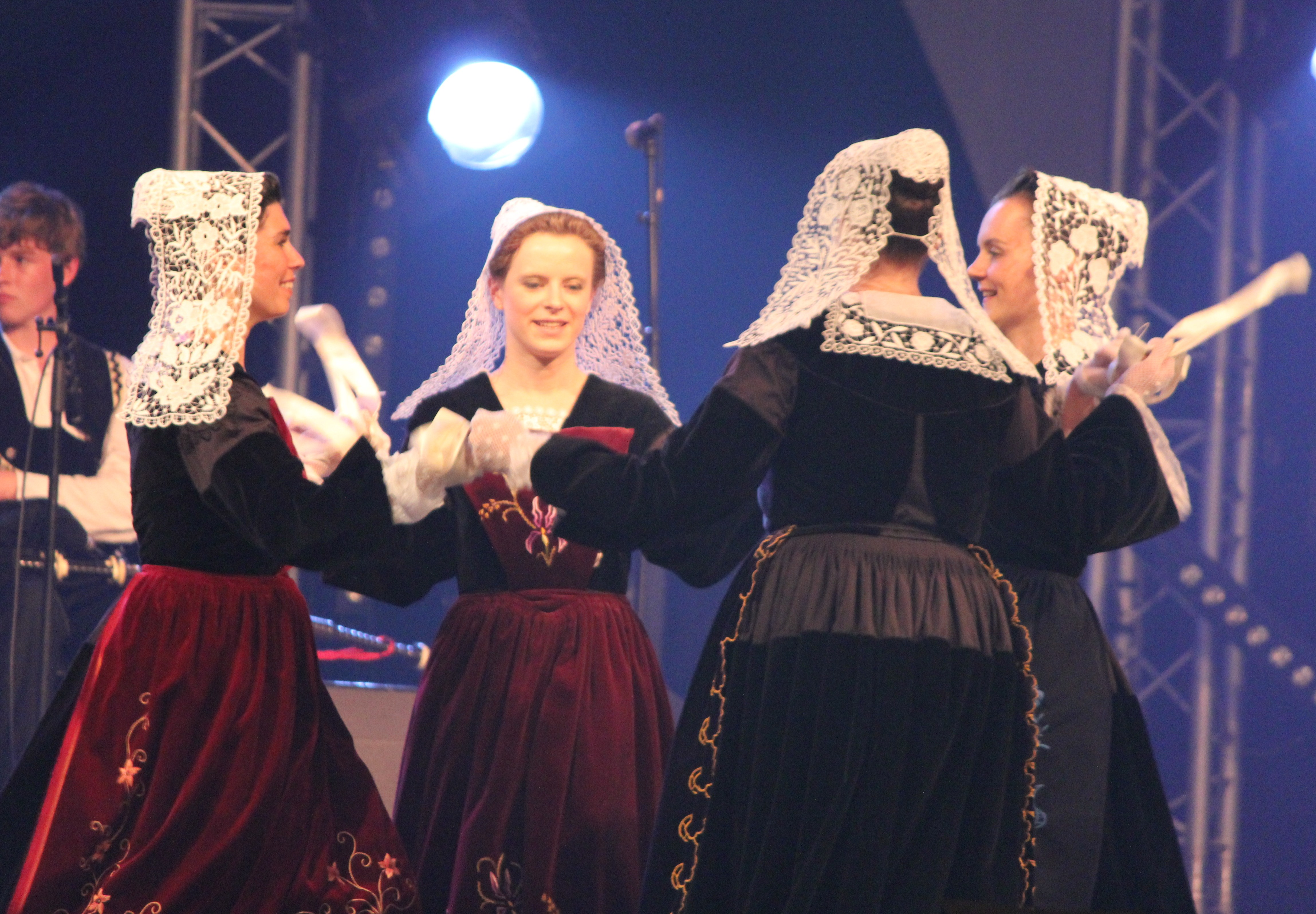 Cercle celtique Bugalé Melrand lors du Festival Interceltique de Lorient 2011.